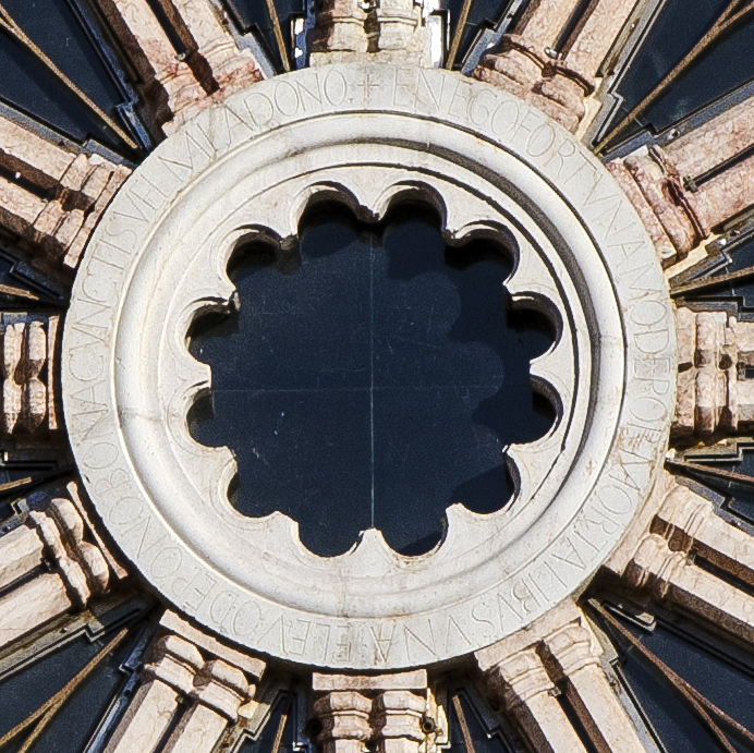 Dettaglio del rosone della basilica di San Zeno, detto "Ruota della Fortuna". Crop/ritaglio di File:Basilica di San Zeno 02.jpg